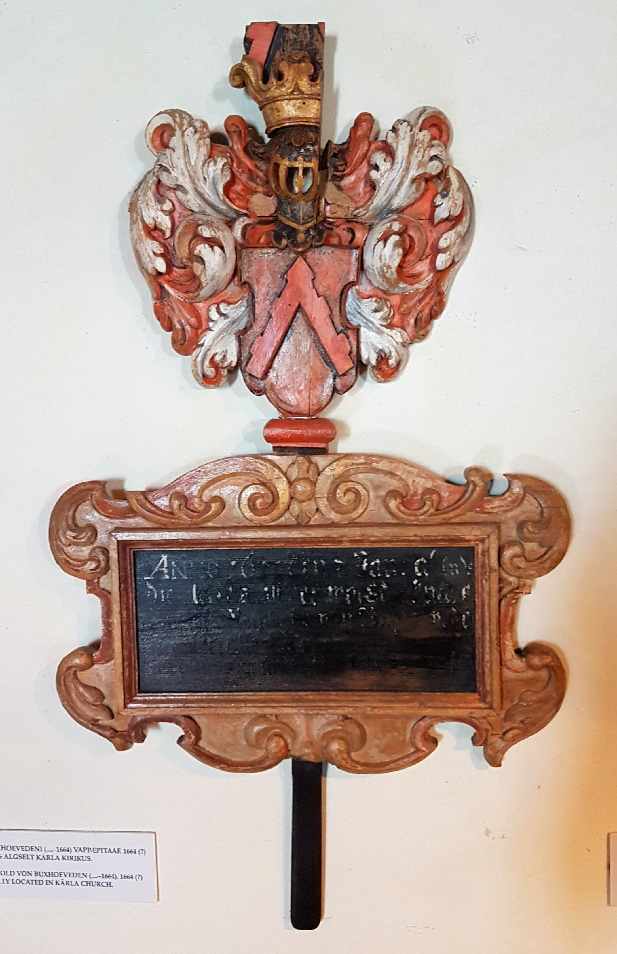 Reinhold von Buxhoevedeni (surnud 1664) vappepitaaf Kärla kirikust. Asub praegu Saaremaa Muuseumi püsiekspositsioonis Kuressaare linnuses.